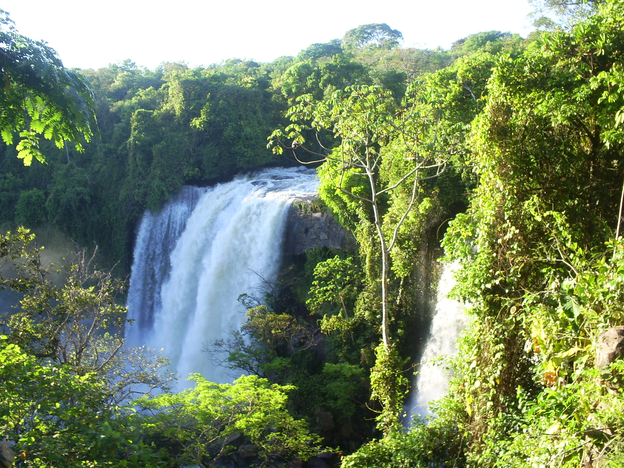 Cachoeira mais alta do conjunto Salto do Curuá,antes do ínicio da construção das PHC's